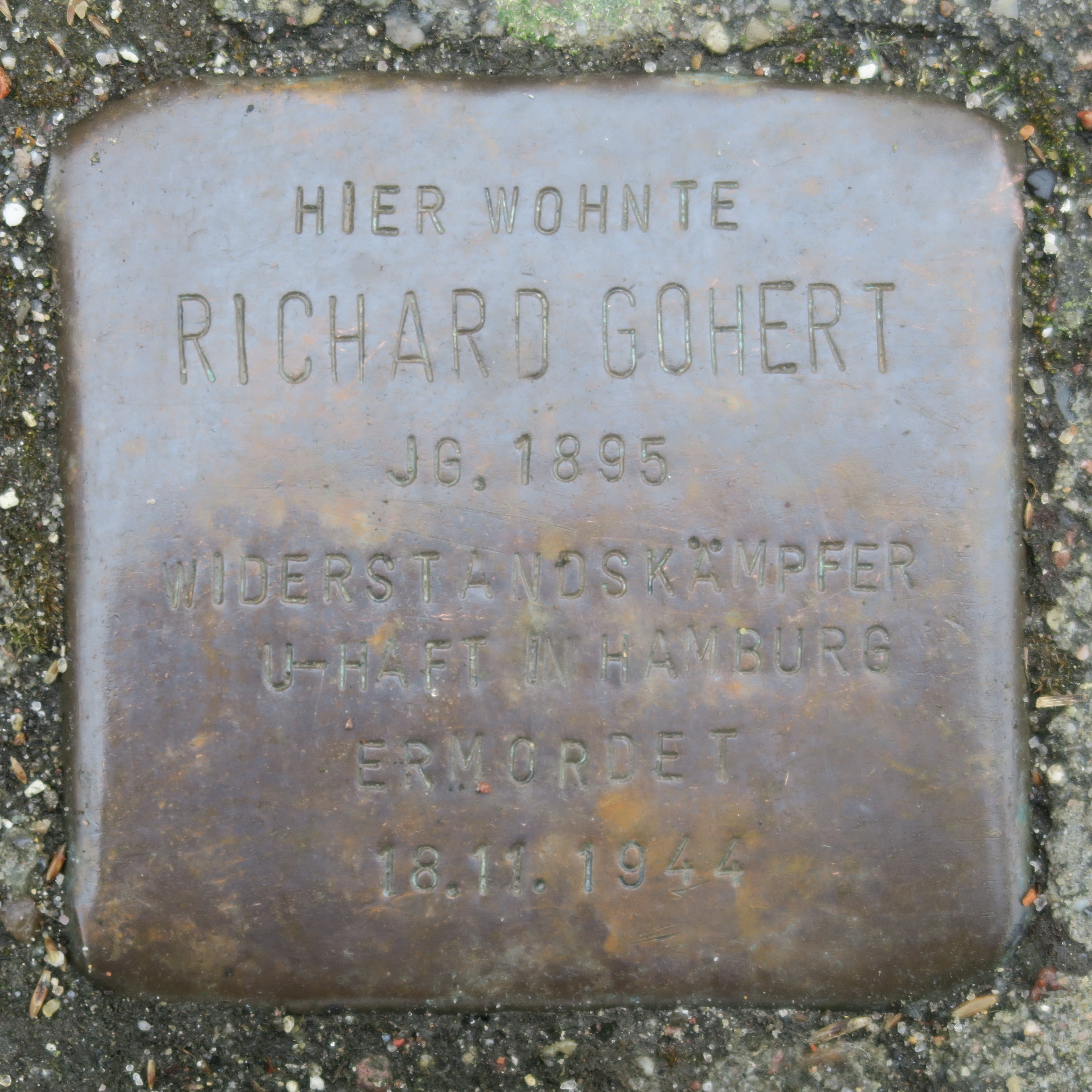 Stolperstein für Richard Gohert in Hamburg-Wilstorf